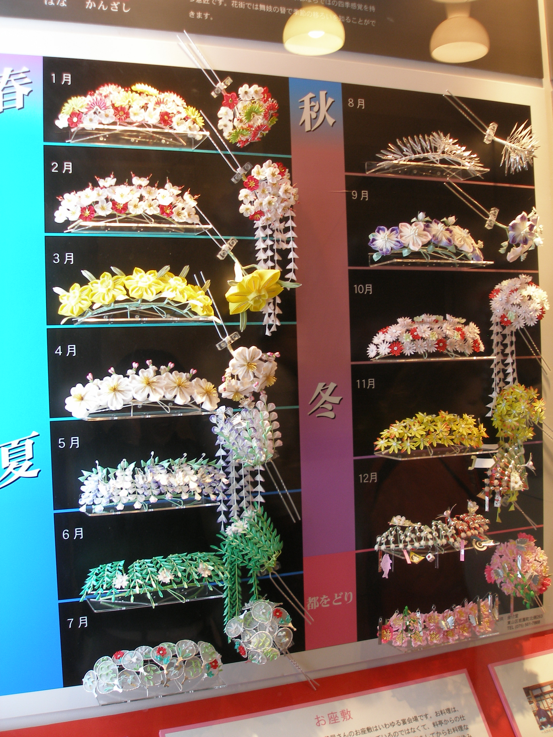 Maiko Headdresses